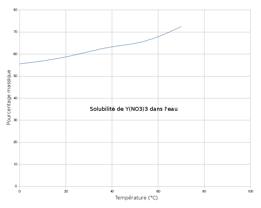 Solubilité du nitrate d'yttrium dans l'eau en fonction de la température